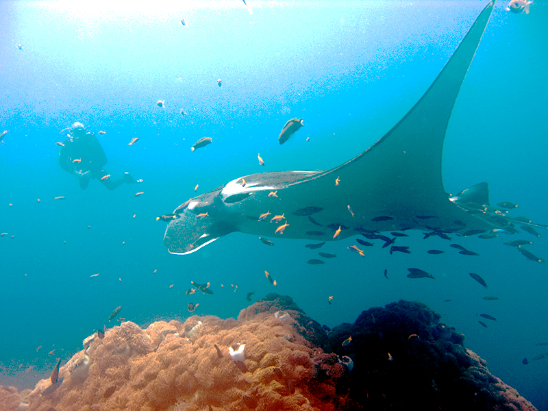 Manta Ray (Manta birostris) at Hin Daeng, Thailand.